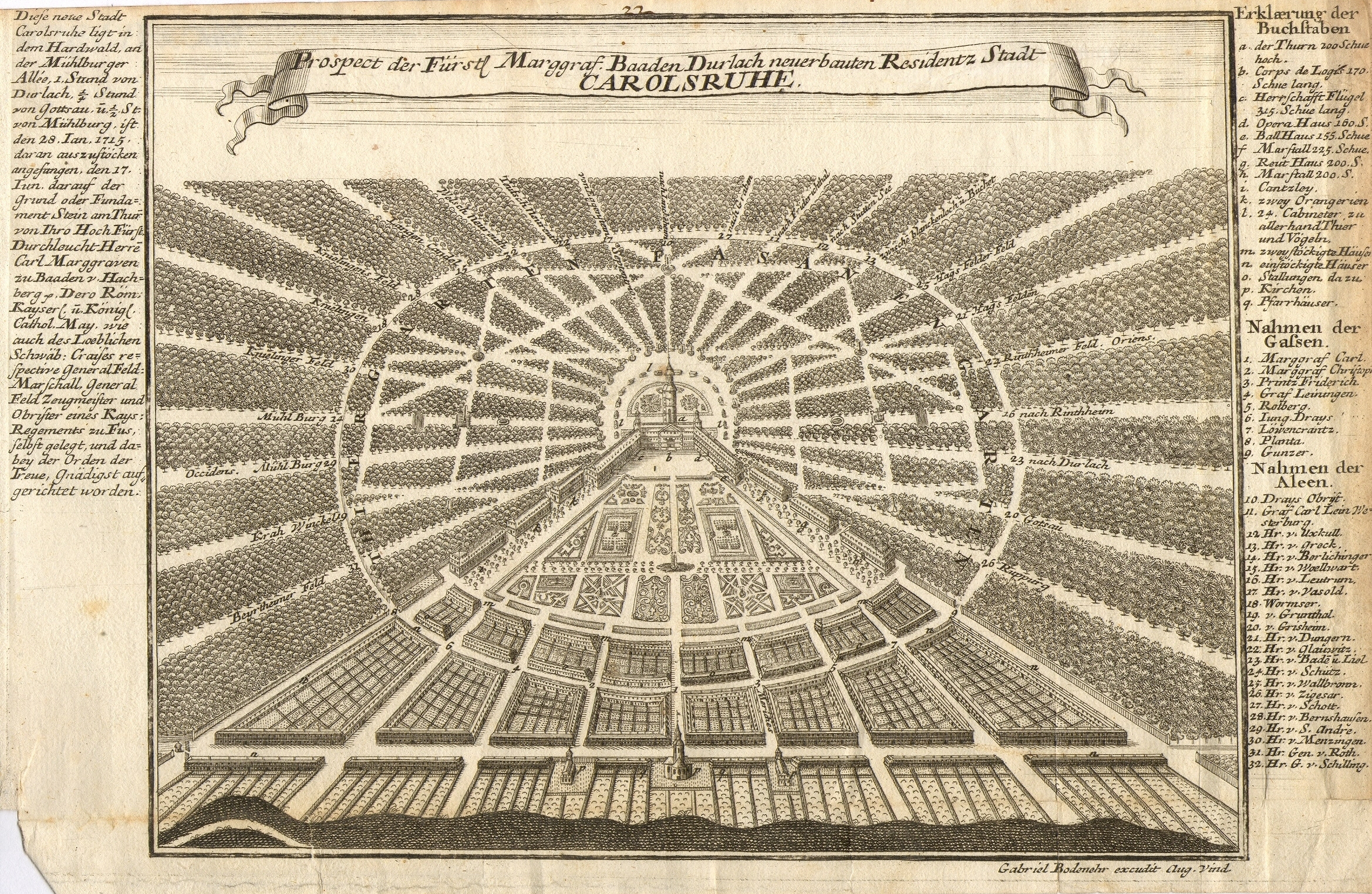 Prospect der Fürstl. Marggraf Baden Durlach neu erbauten Residentz Stadt Carolsruhe. Kupferstich, unkoloriert.